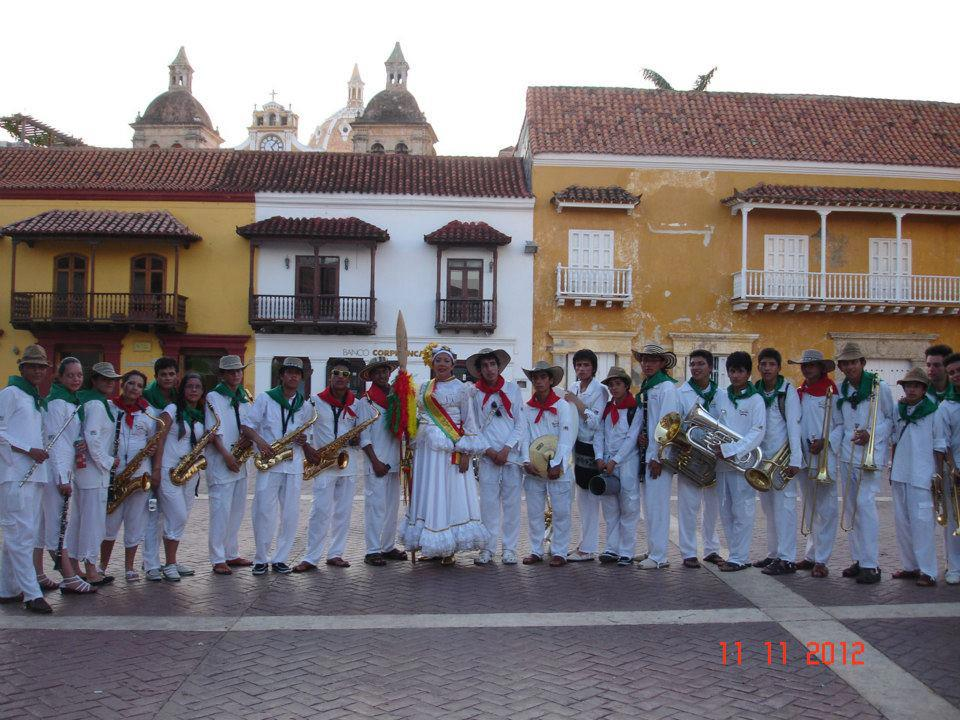 Banda fiestera de Facatativá 2012 representando el municipio en Cartagena